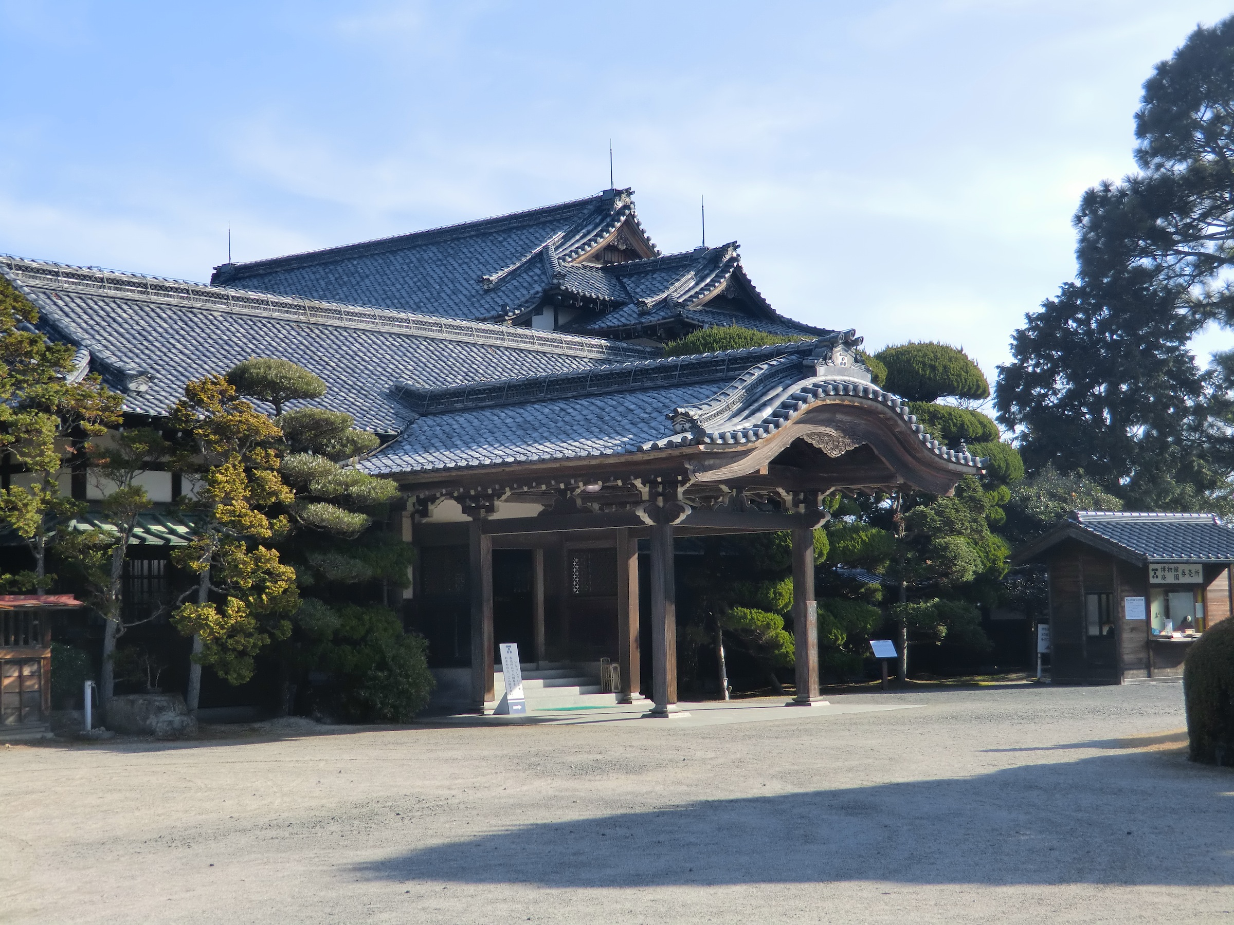 防府毛利邸・毛利博物館（防府市）